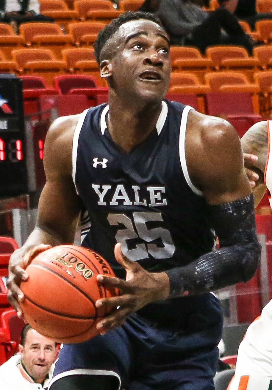 3B7A6104